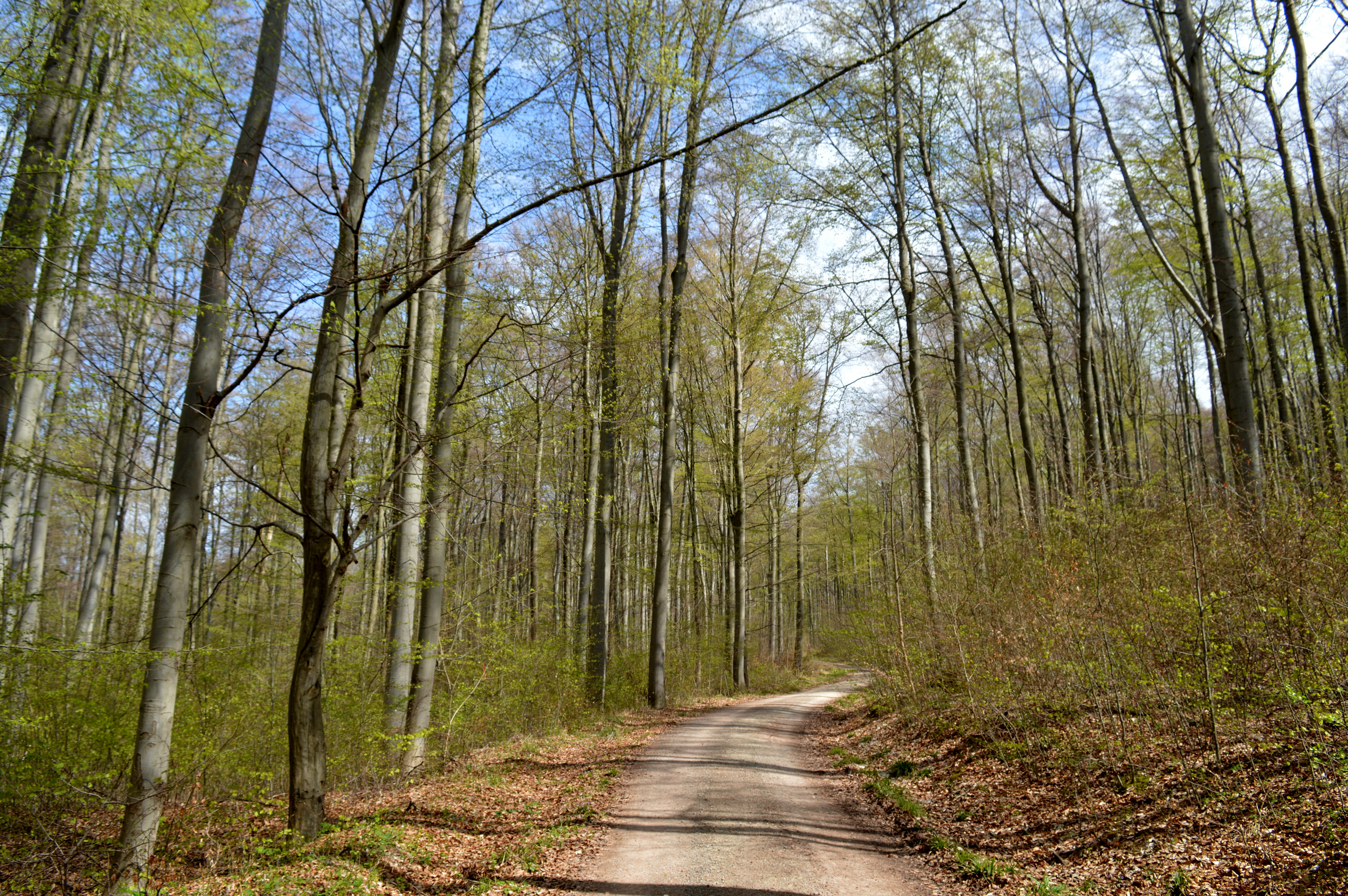 Naturschutzgebiet Herrenberg und Vorberg im Huy - Unterhalb des Weinbergs (1)